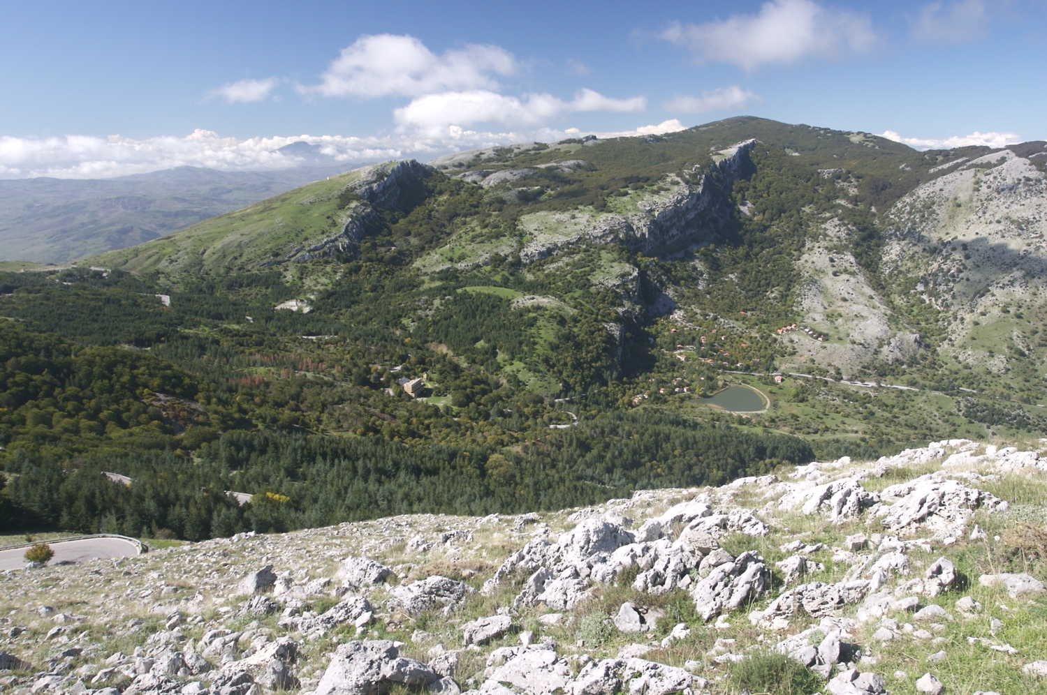 Von Piano Battaglia zum Pizzo Carbonara